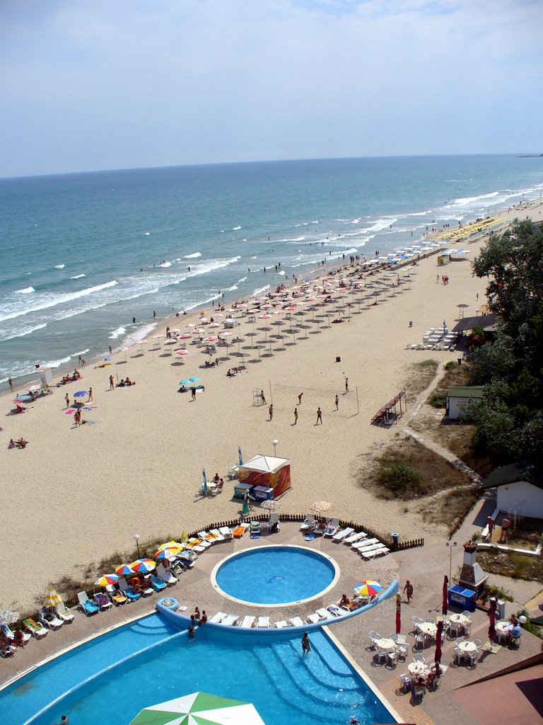 Albena beach